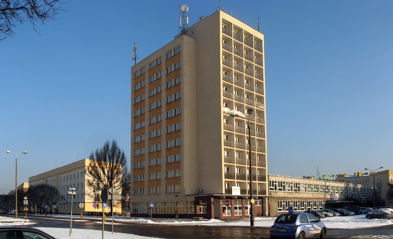 Dawny hotel Garnizonowy na osiedlu Leśnym w Bydgoszczy